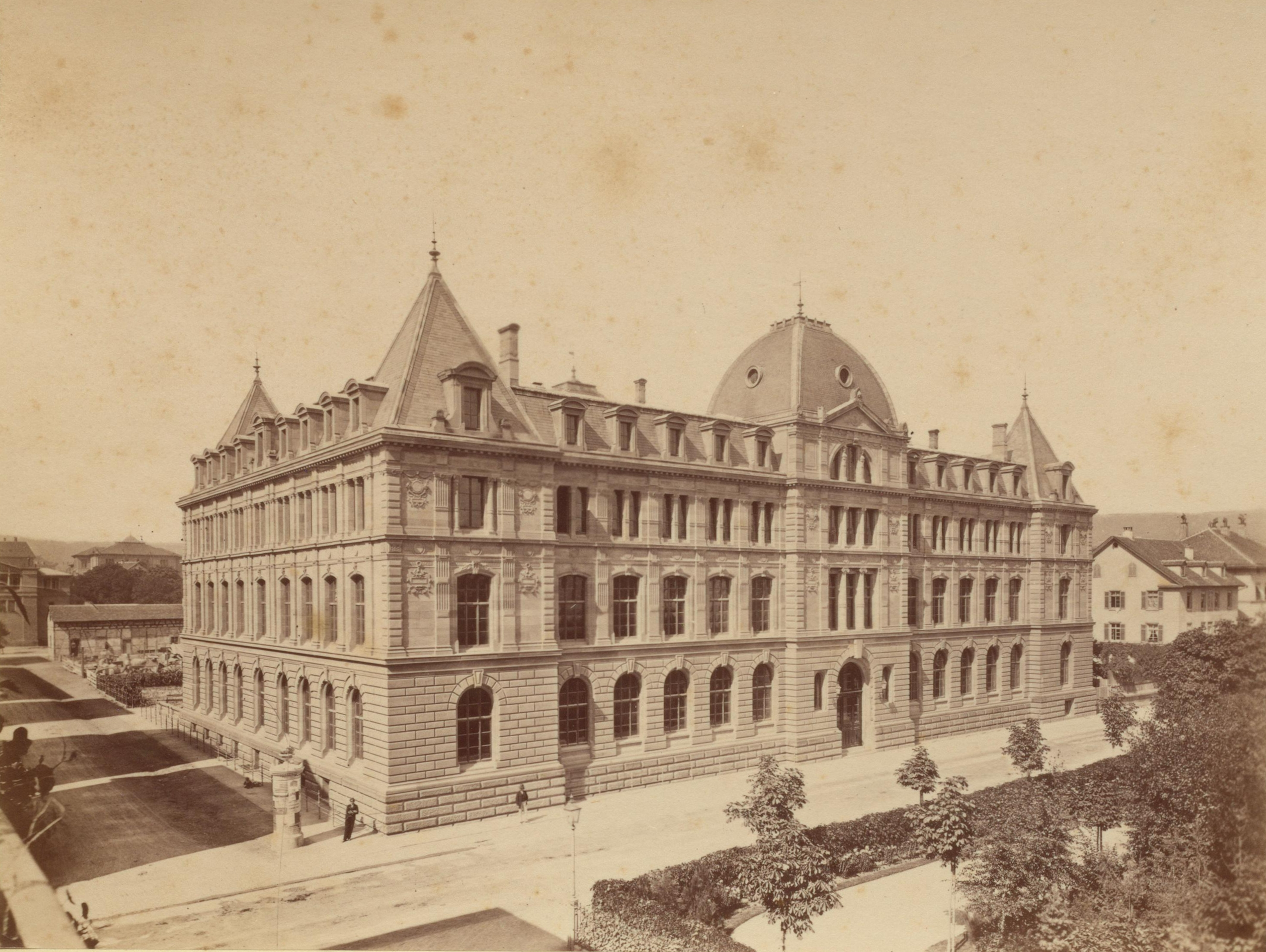 „Königliche Baugewerkeschule in Stuttgart“ von Joseph von Egle, Foto von Friedrich Brandseph, 1876, Stuttgart, Schellingstraße 24. Die Schule wurde meist als Höhere Bauschule bezeichnet, das Gebäude auch als Egle-Bau. Sie war der Vorläufer der heutigen Hochschule für Technik Stuttgart.